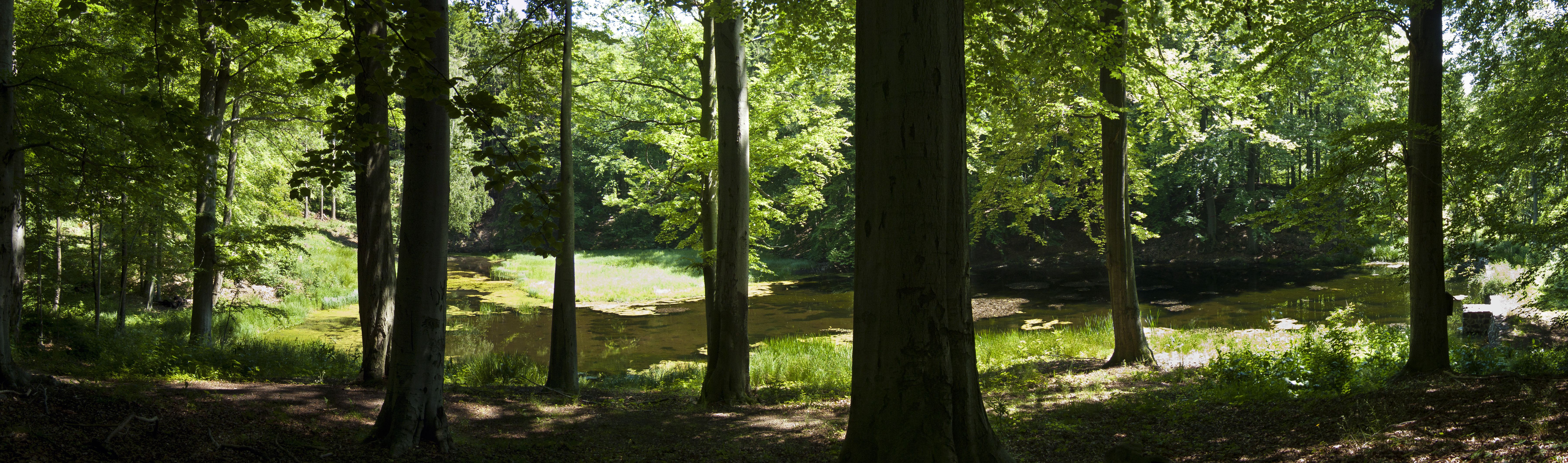 Přírodní památka Jezírko pod Táborem - panorama.